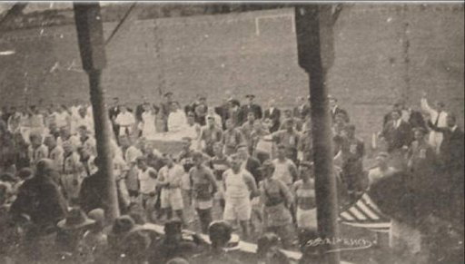 olimpiadas